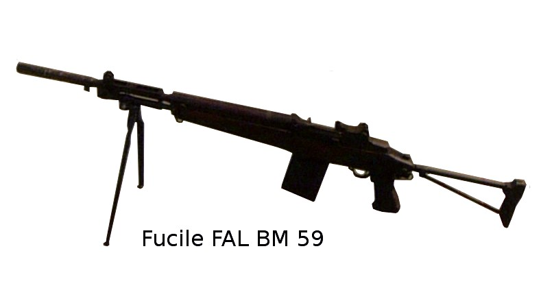 Fucile d'assalto leggero Beretta BM 95